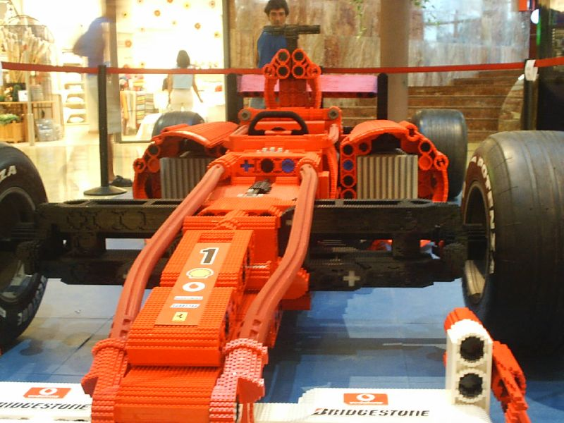 Ferrary Lego visto de frente.